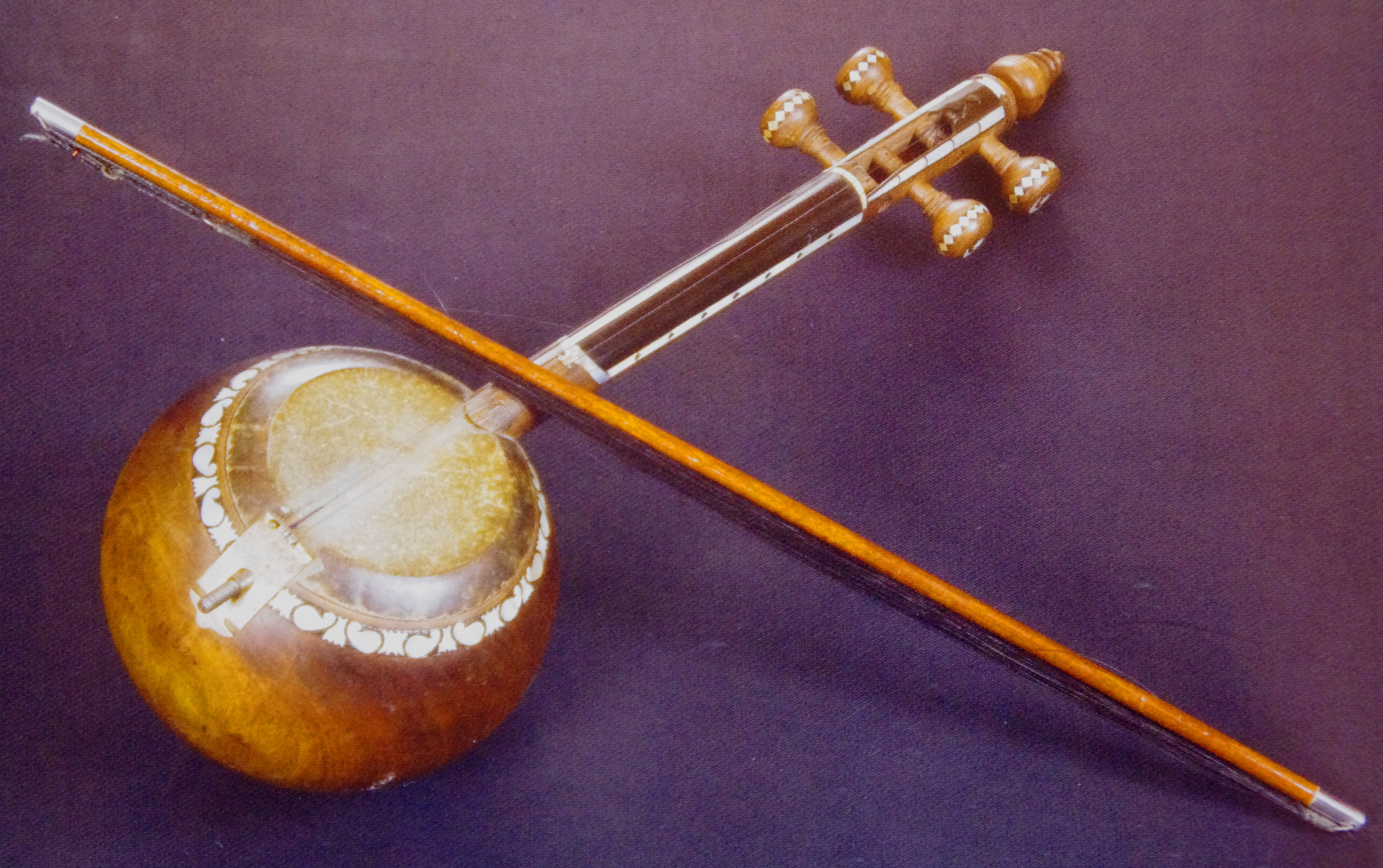 Azərbaycan milli musiqi aləti kamaça